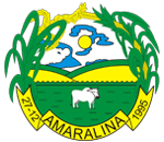 Brasão de Amaralina, Goiás, Brasil.